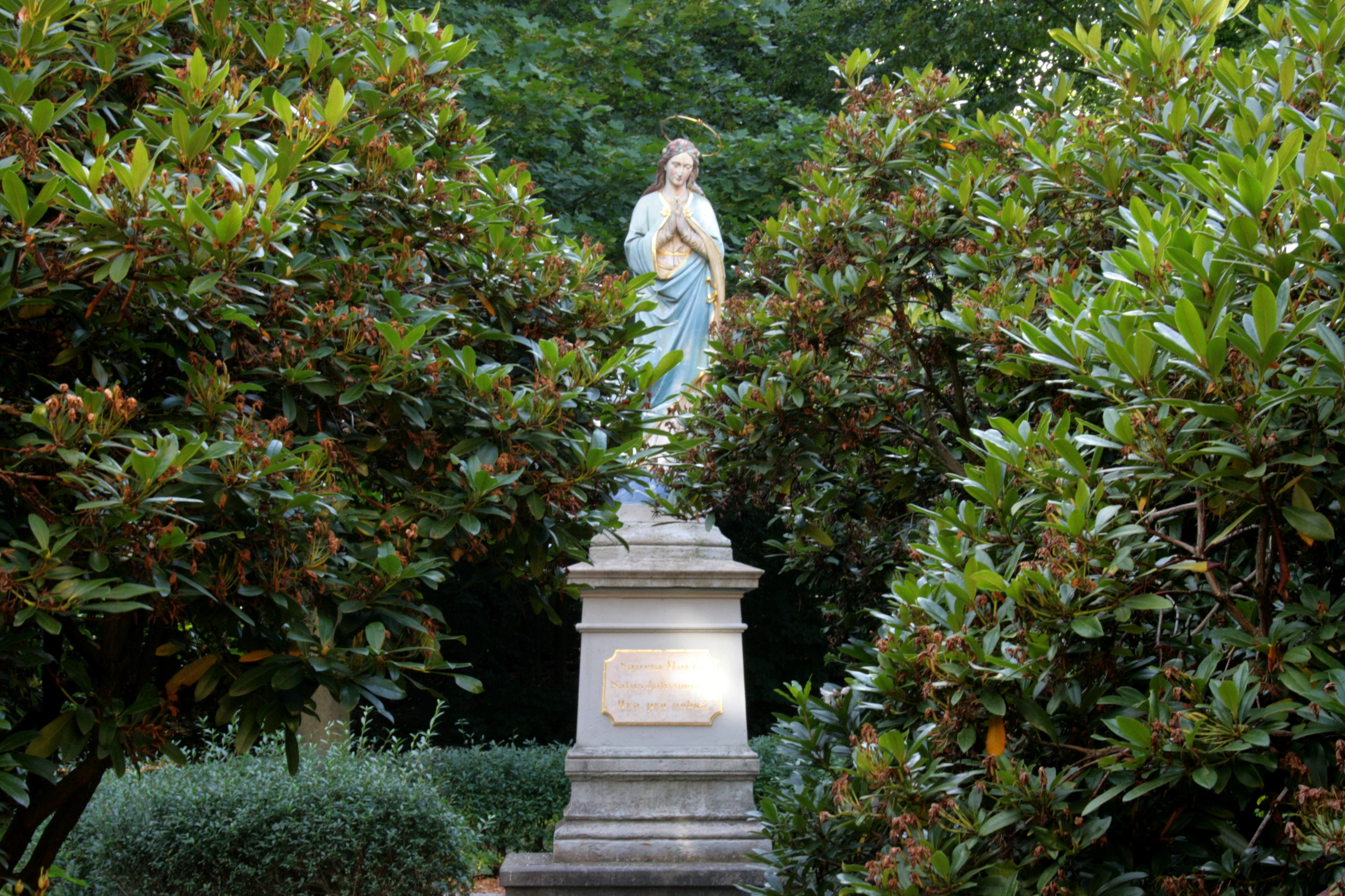 Am Hof in Schirgiswalde